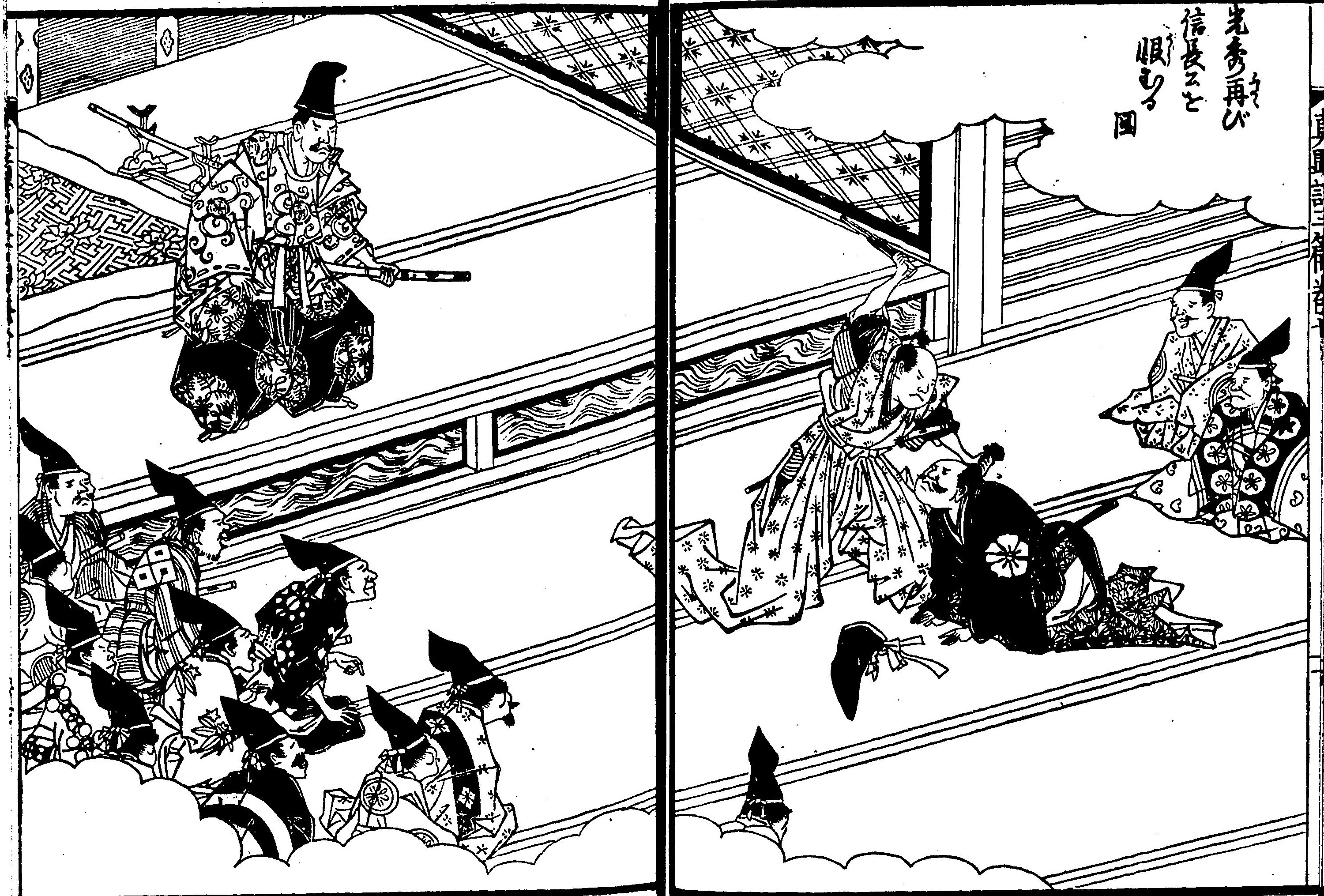 『絵本太閤記』の一場面。（絵：岡田玉山） 「光秀再び信長公恨むる図」